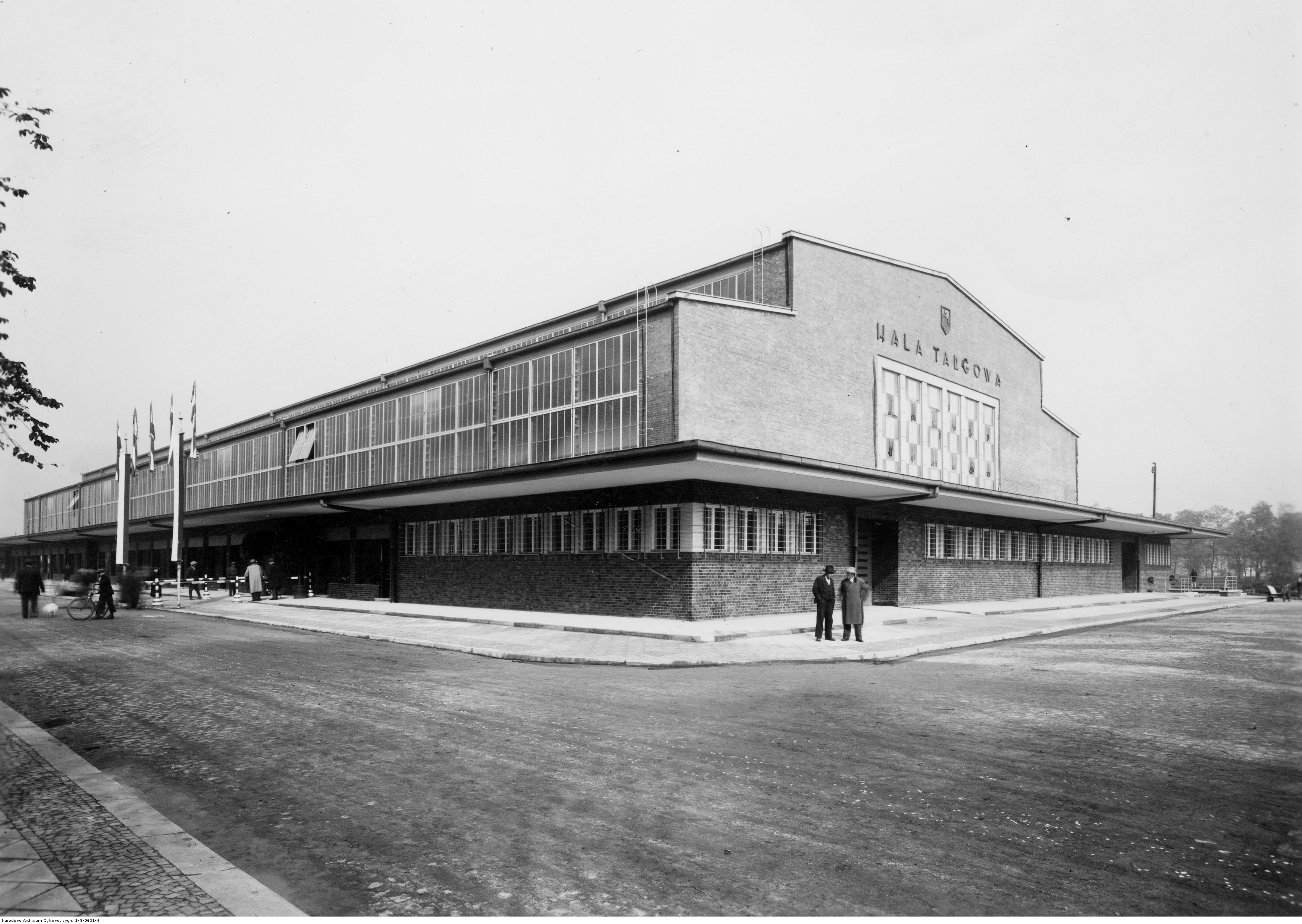 Katowice. Budynek Hali Targowej - widok zewnętrzny. 1936 (Koncern Ilustrowany Kurier Codzienny — Archiwum Ilustracji)